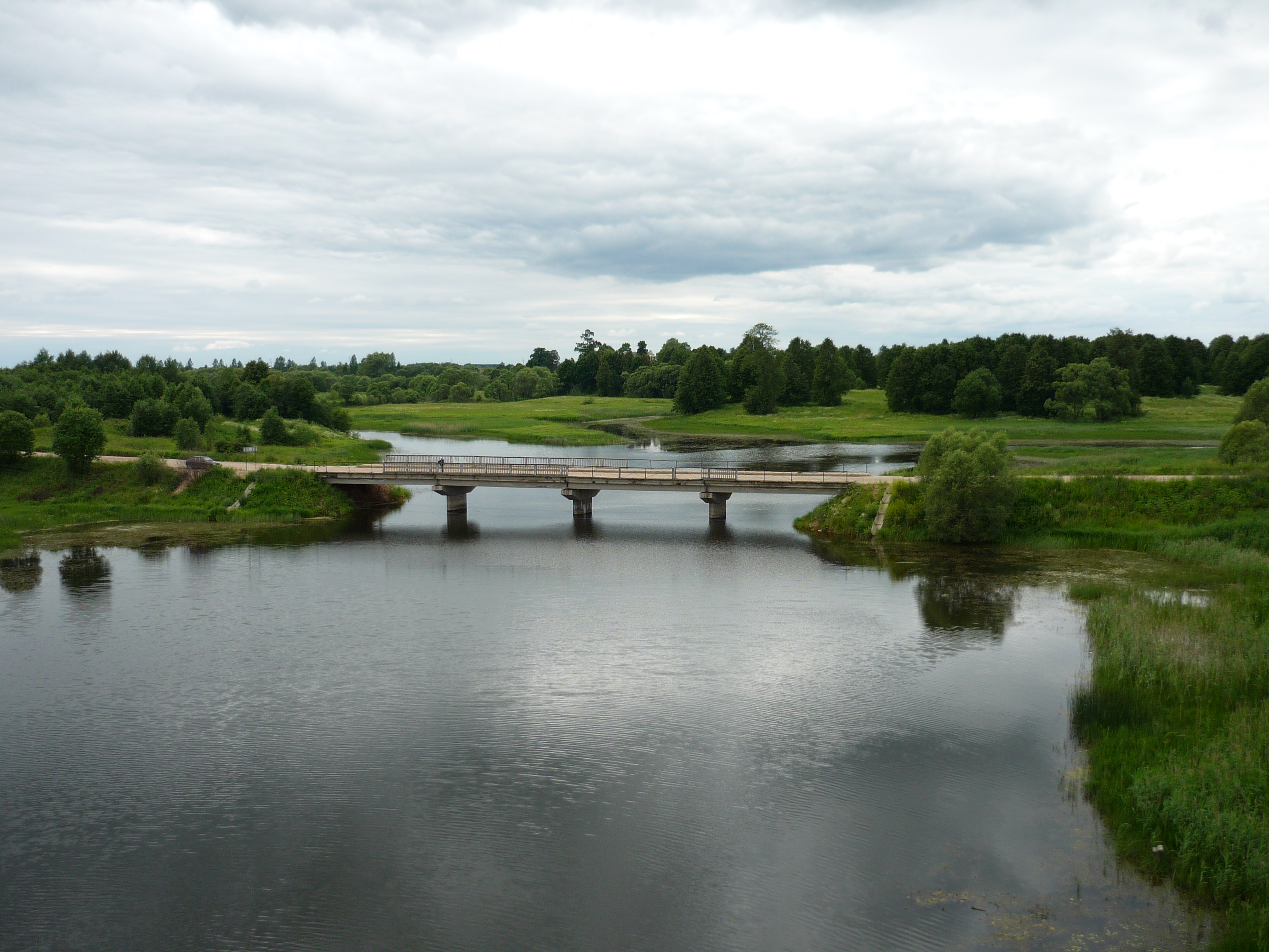 Устье Яблони недалеко от Сычёвки